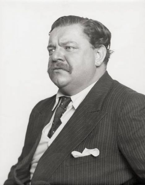 Hugo Erfurth - Portrait des Schauspielers Heinrich George, gelatin silver print, 11.93 in. (30.30 cm.) (height) by 9.37 in. (23.80 cm.) (width)